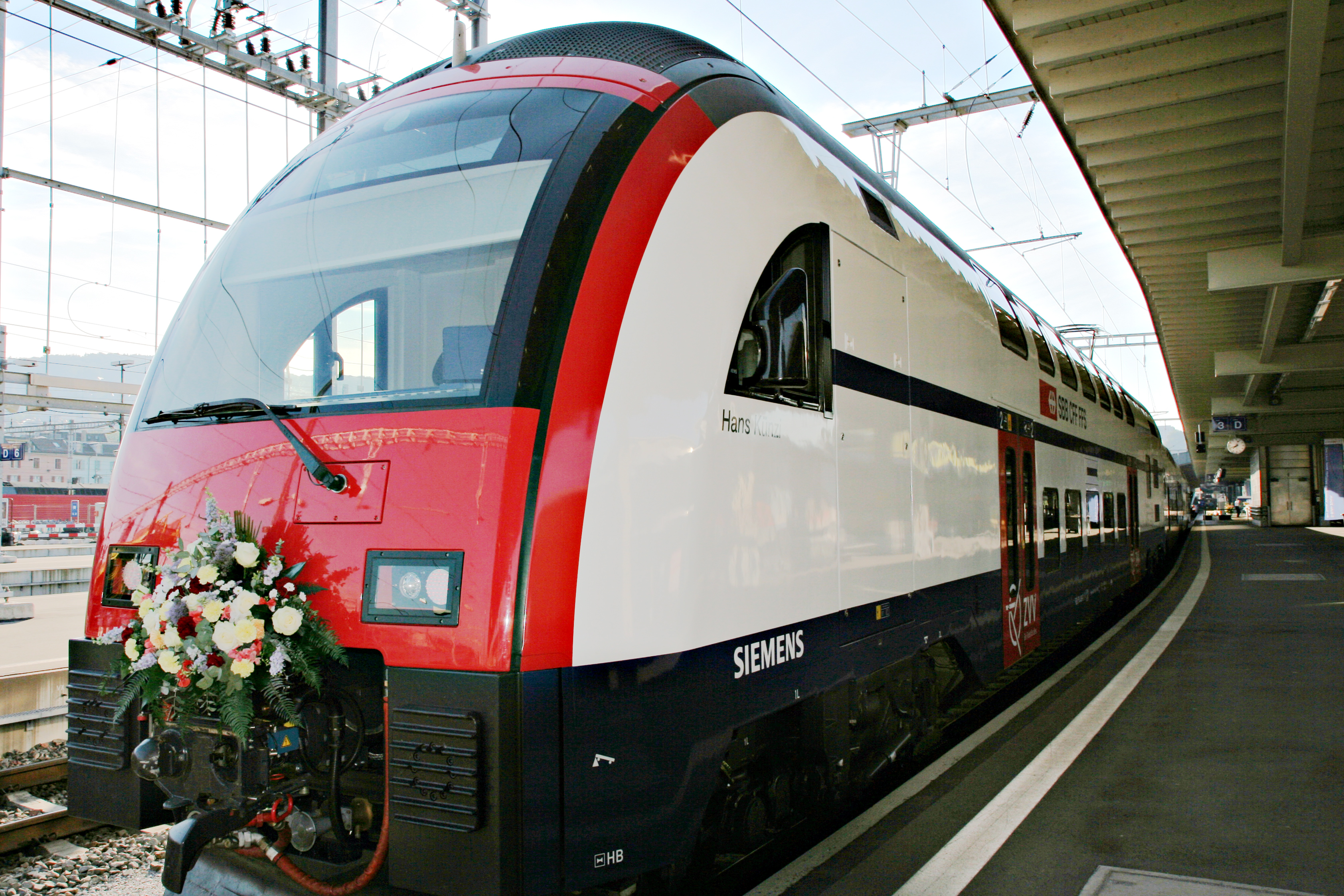 SBB RABe 514 bei der Einweihung im Bahnhof Zürich Hauptbahnhof, provisorisches Gleisfeld "Sihlpost" entstanden bei starkem Gegenlicht mit Aufhellblitz und nachträglicher elektronischer Aufhellung